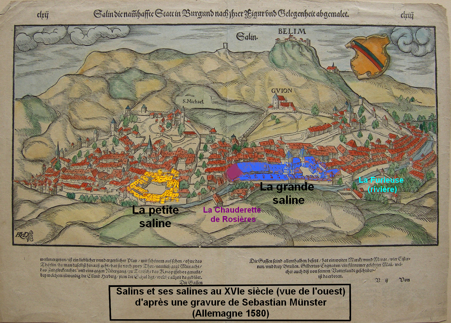 Salins et ses salines au XVIe siècle d'après une gravure sur bois de Sebastian Mûnster (Allemagne 1580)